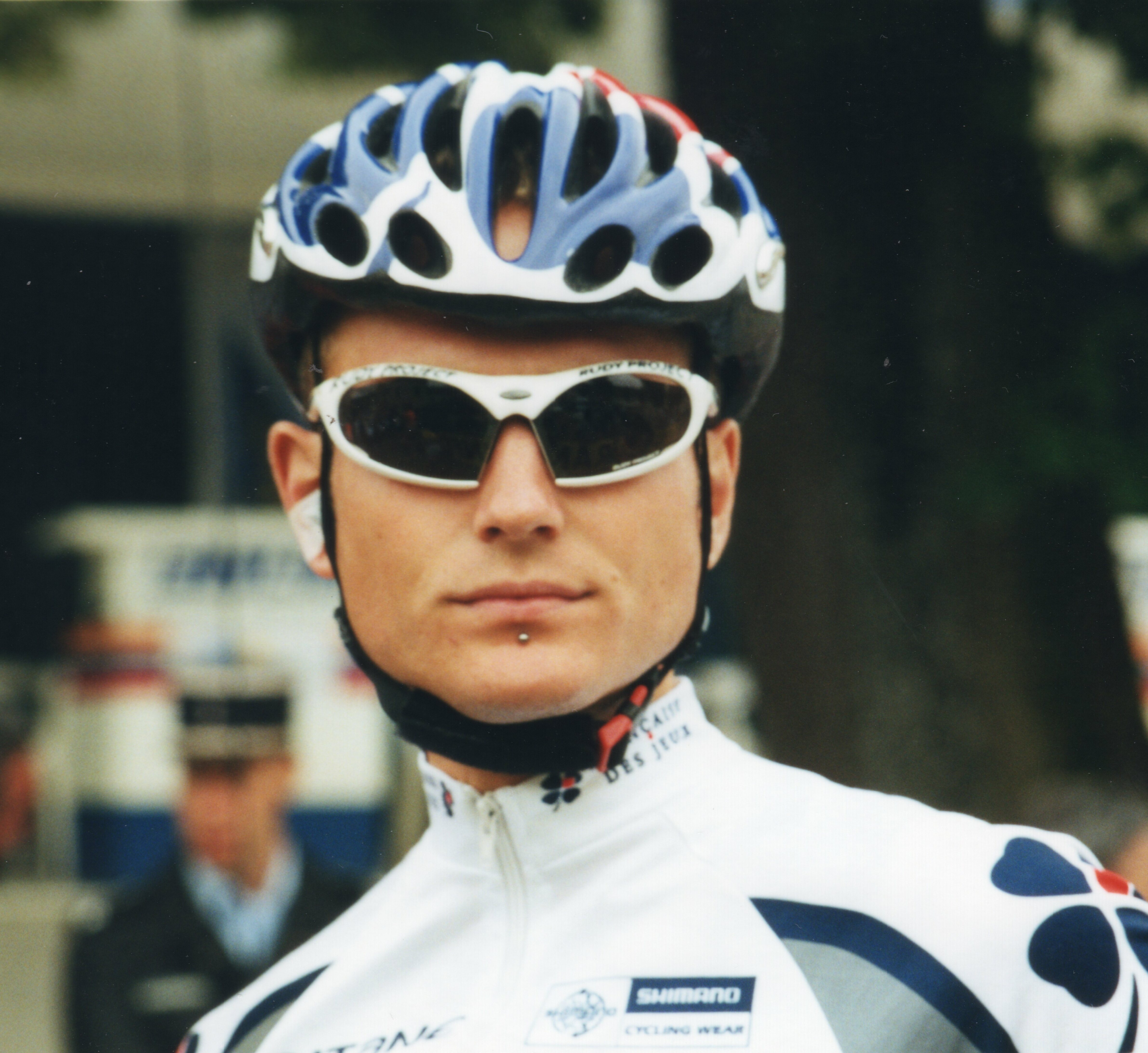 Regis Lhuillier lors du Tour de l'Avenir 2001